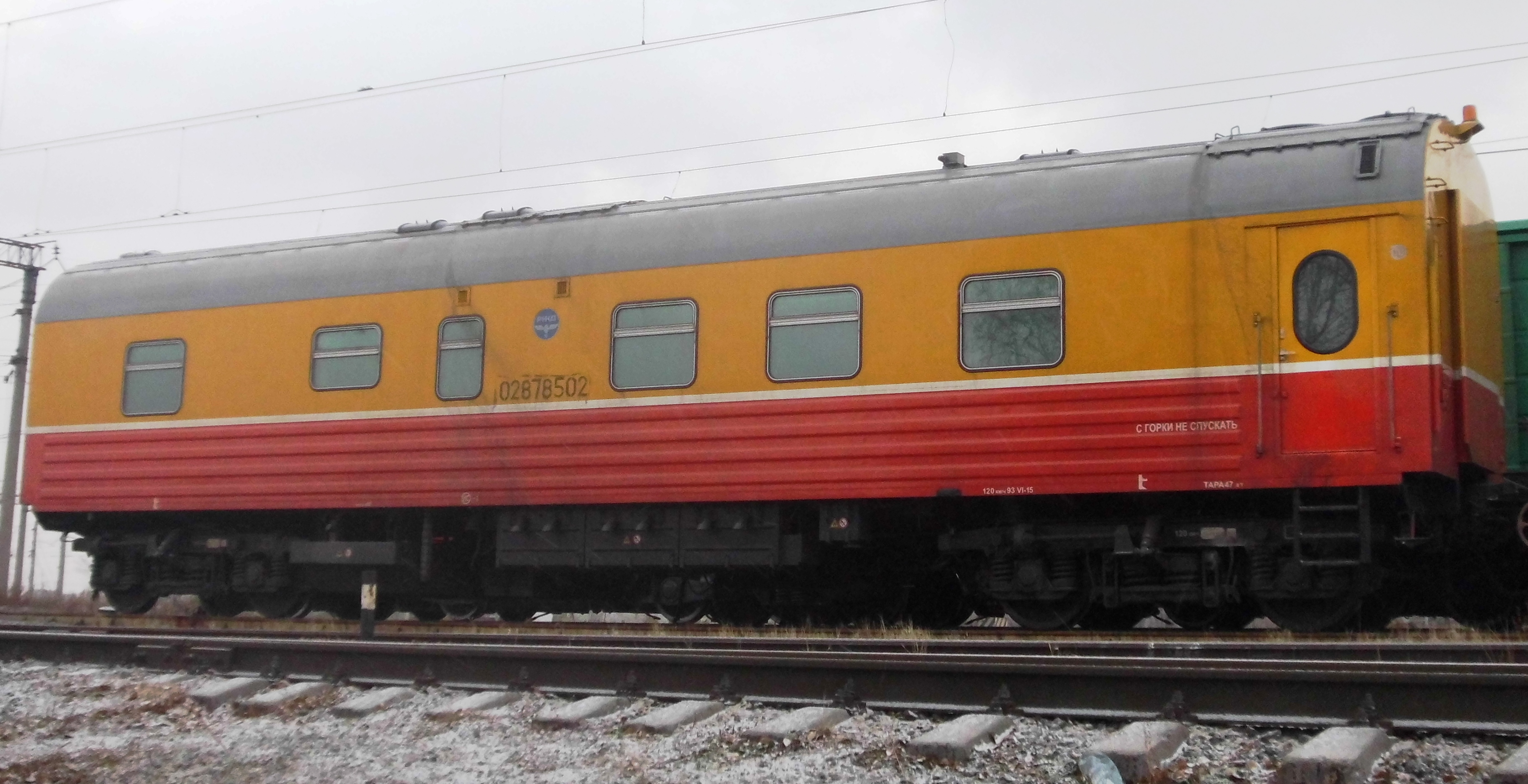 Вагон сопровождения модели 61-4484 в хвосте рельсовозного состава РС-800/3. Железнодорожная станция Металлургическая ЮУЖД. Тверской вагоностроительный завод.